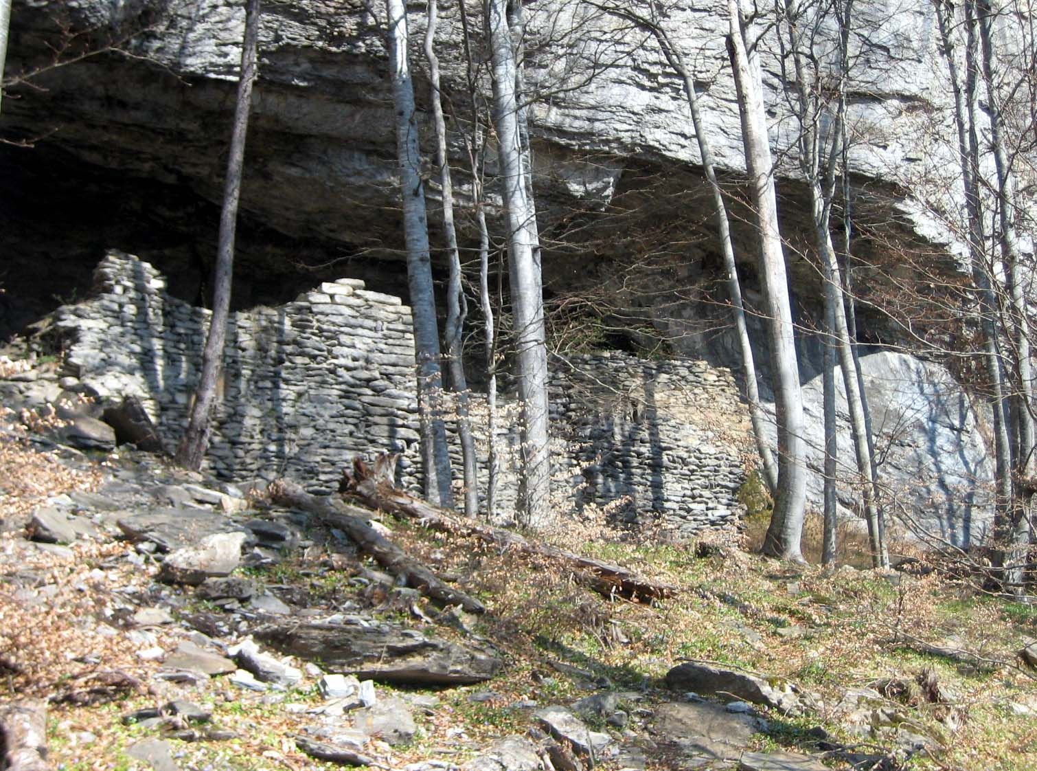 Grottenstein von aussen